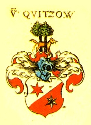 Wappen der Märkischen und Sächsischen Adelsfamilie Quitzow